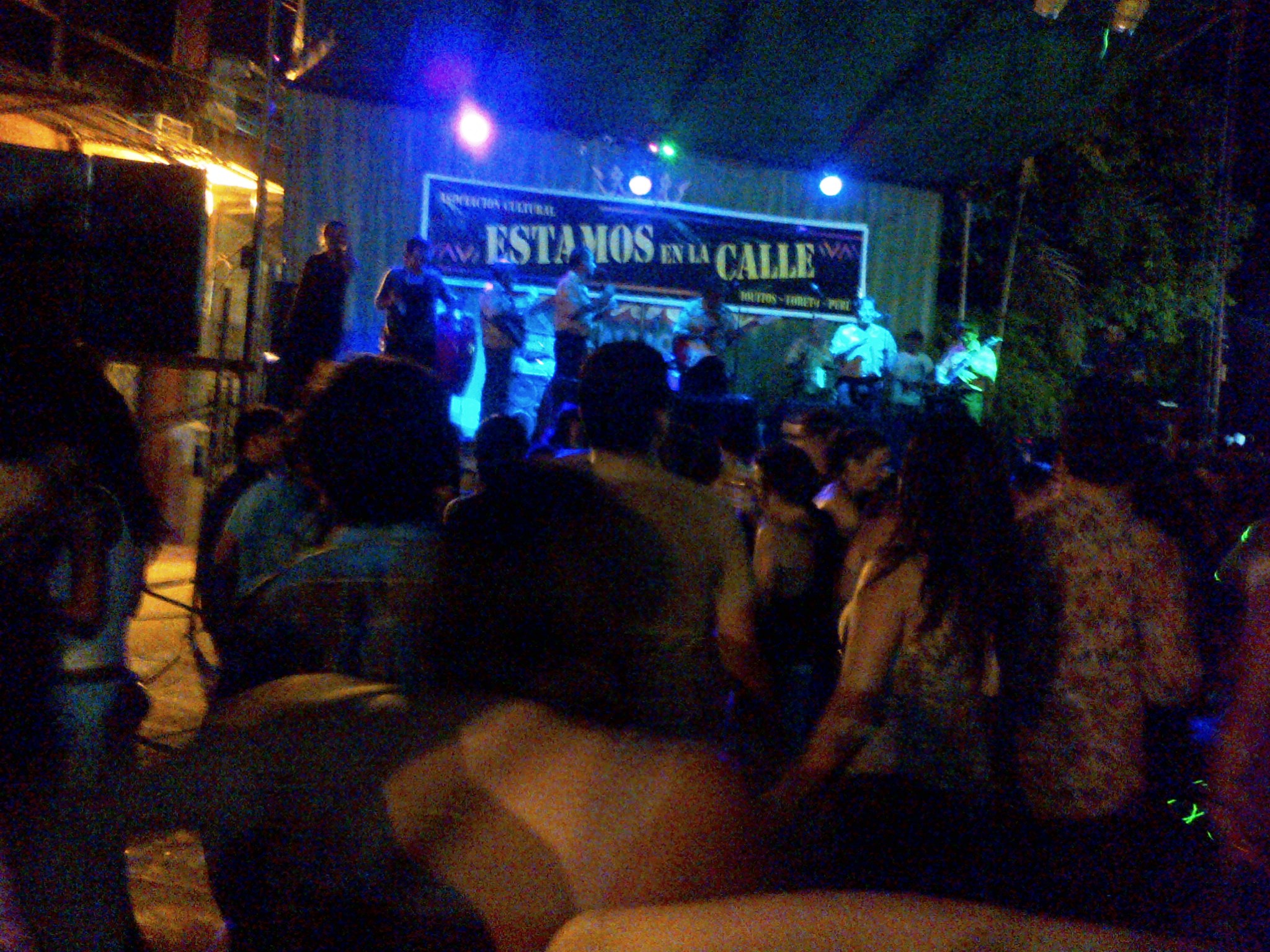 Los Wembler's de Iquitos en el Estamos en la Calle